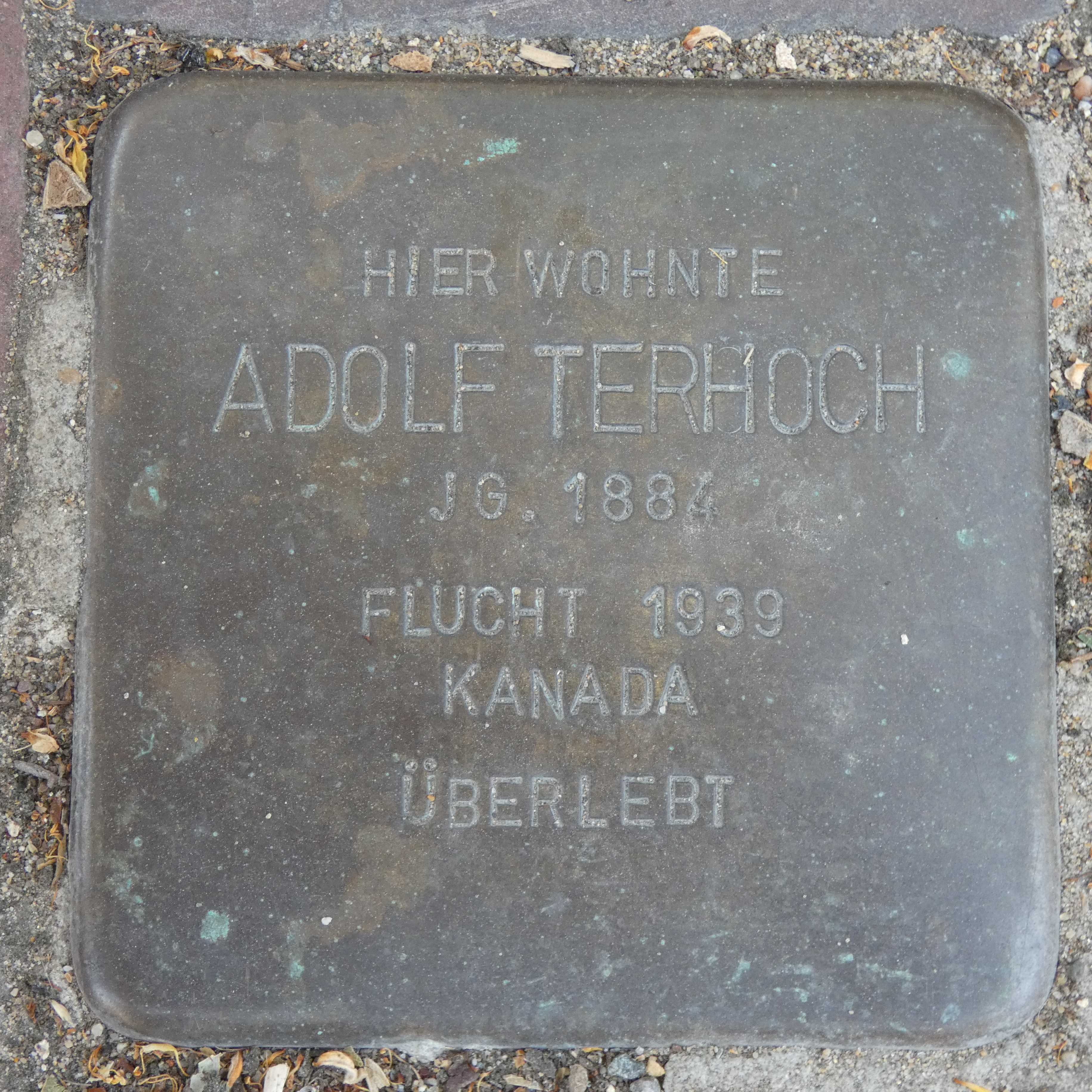 Hier wohnte Adolf Terhoch, Jg. 1884, Flucht 1939 Kanada, überlebt